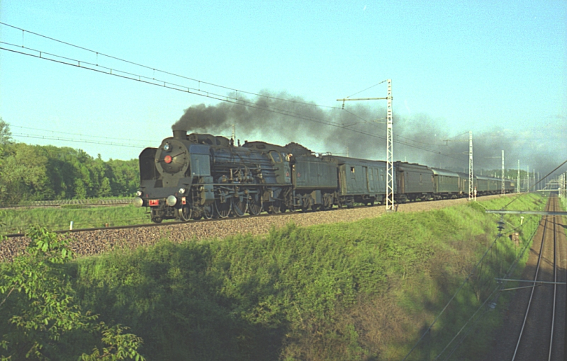 Locomotive à vapeur 'Pacific' 231K8 de passage à Villeneuve La Guyard - Train spécial Lyon-Paris du 06 mai 2005 Ænglisc: French 'Pacific' steam locomotive 231K8 speeds at Villeneuve la Guyard with a special from Lyons to Paris on 2005 6th may